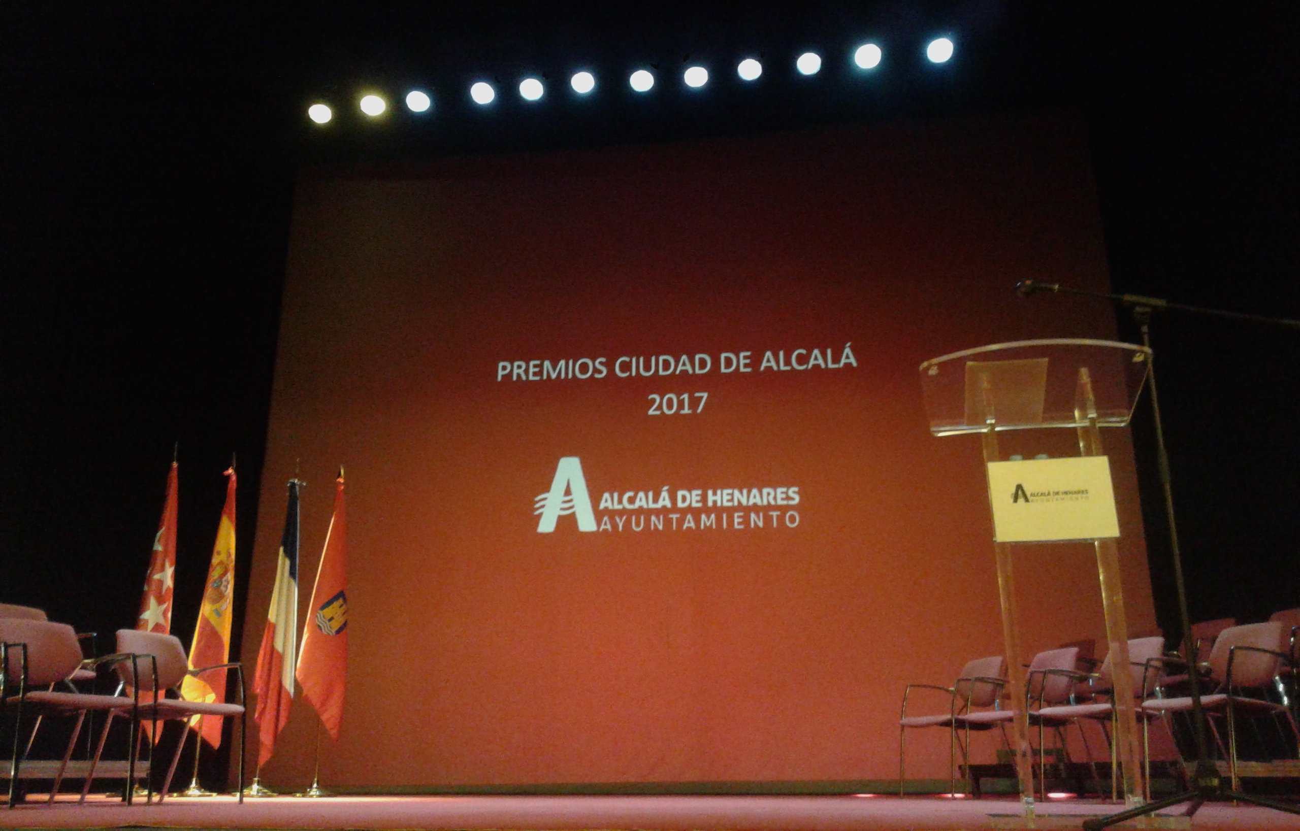 Escenario del Teatro Salón Cervantes de Alcalá de Henares (Comunidad de Madrid - España) donde se entregaron los Premios Ciudad de Alcalá 2017.